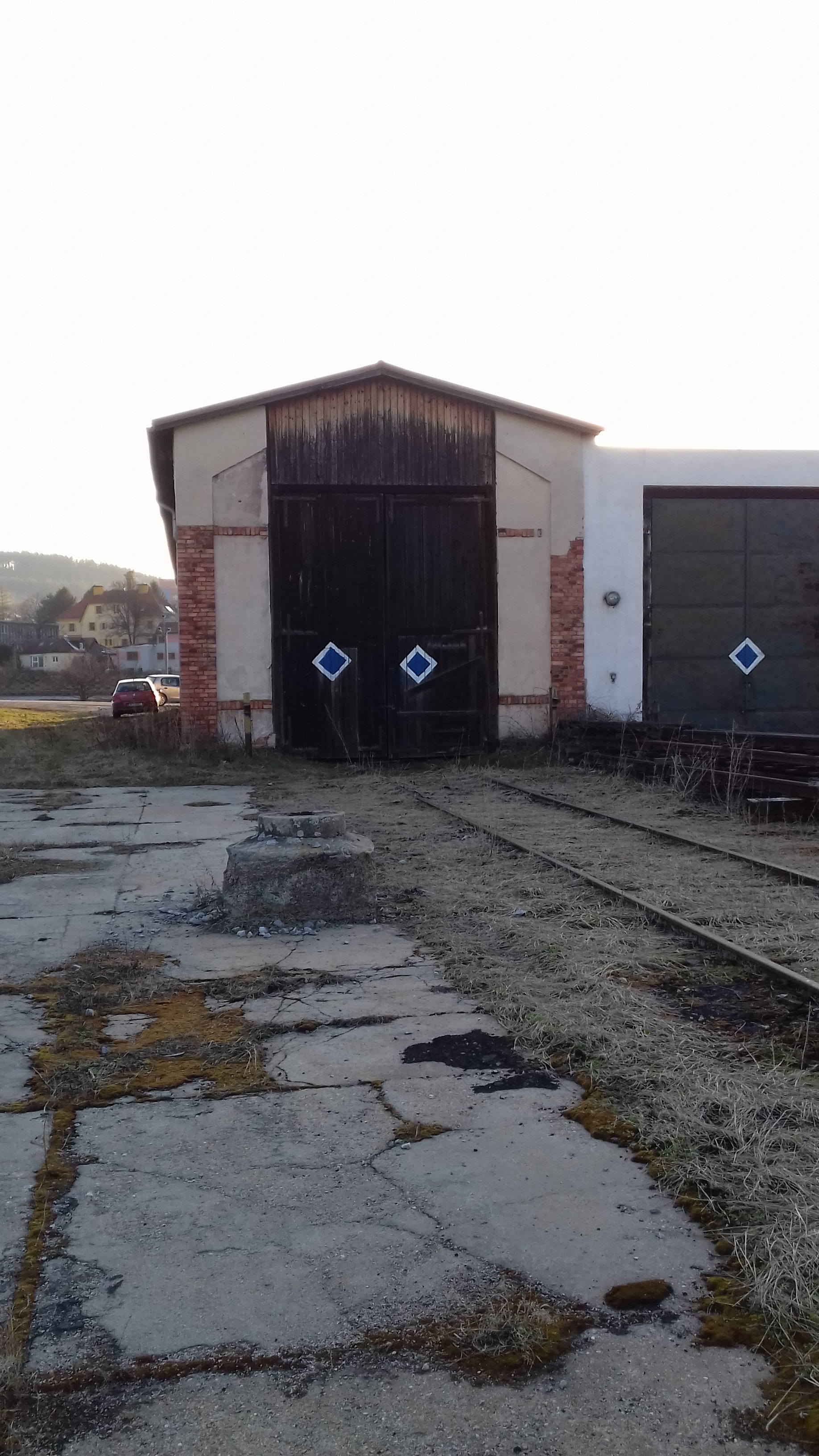 Stará, dnes nepoužívaná remíze pro jednu lokomotivu a dílnu, železniční stanice Kájov